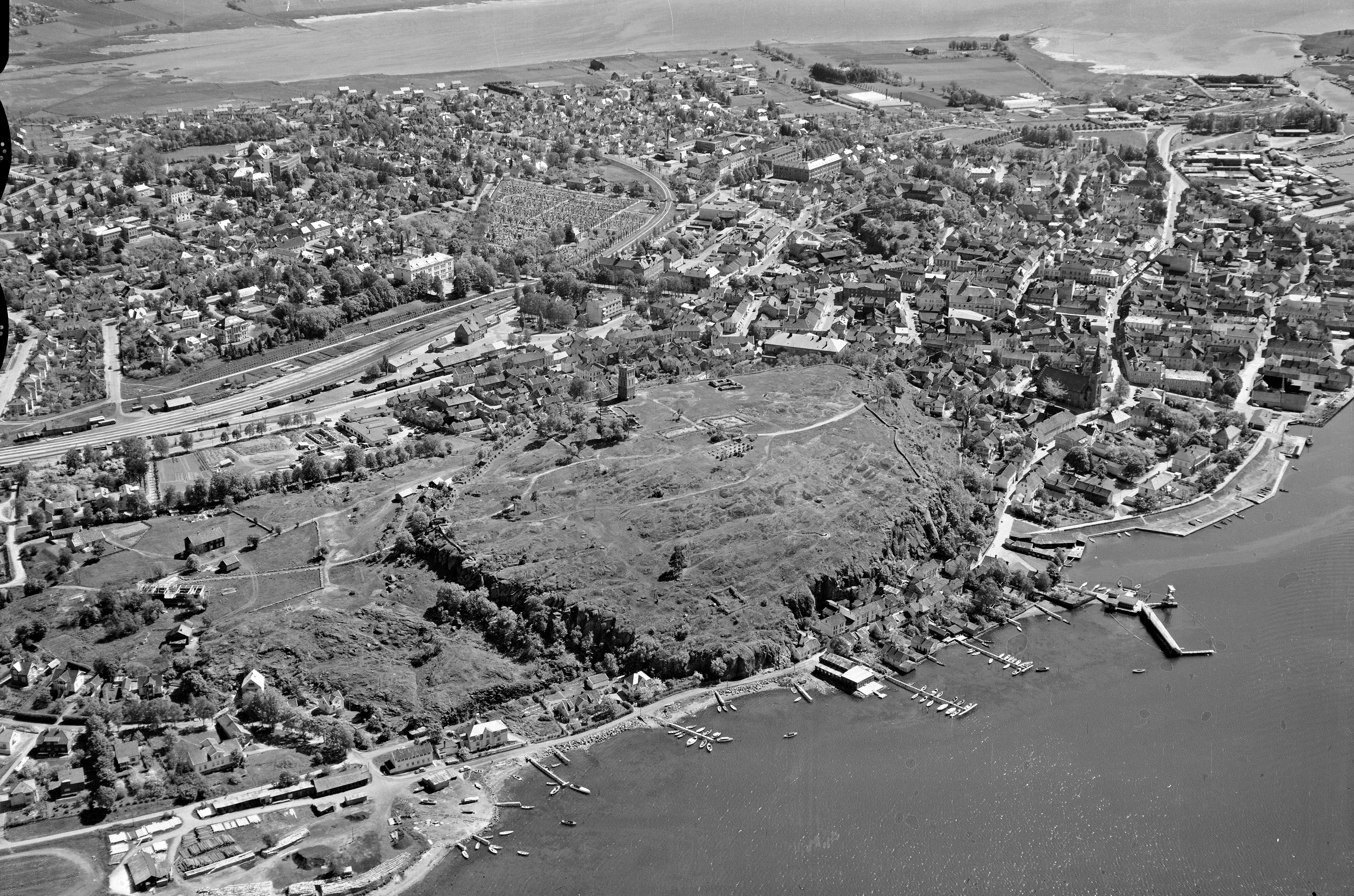 WF.S.uten_nummer_2